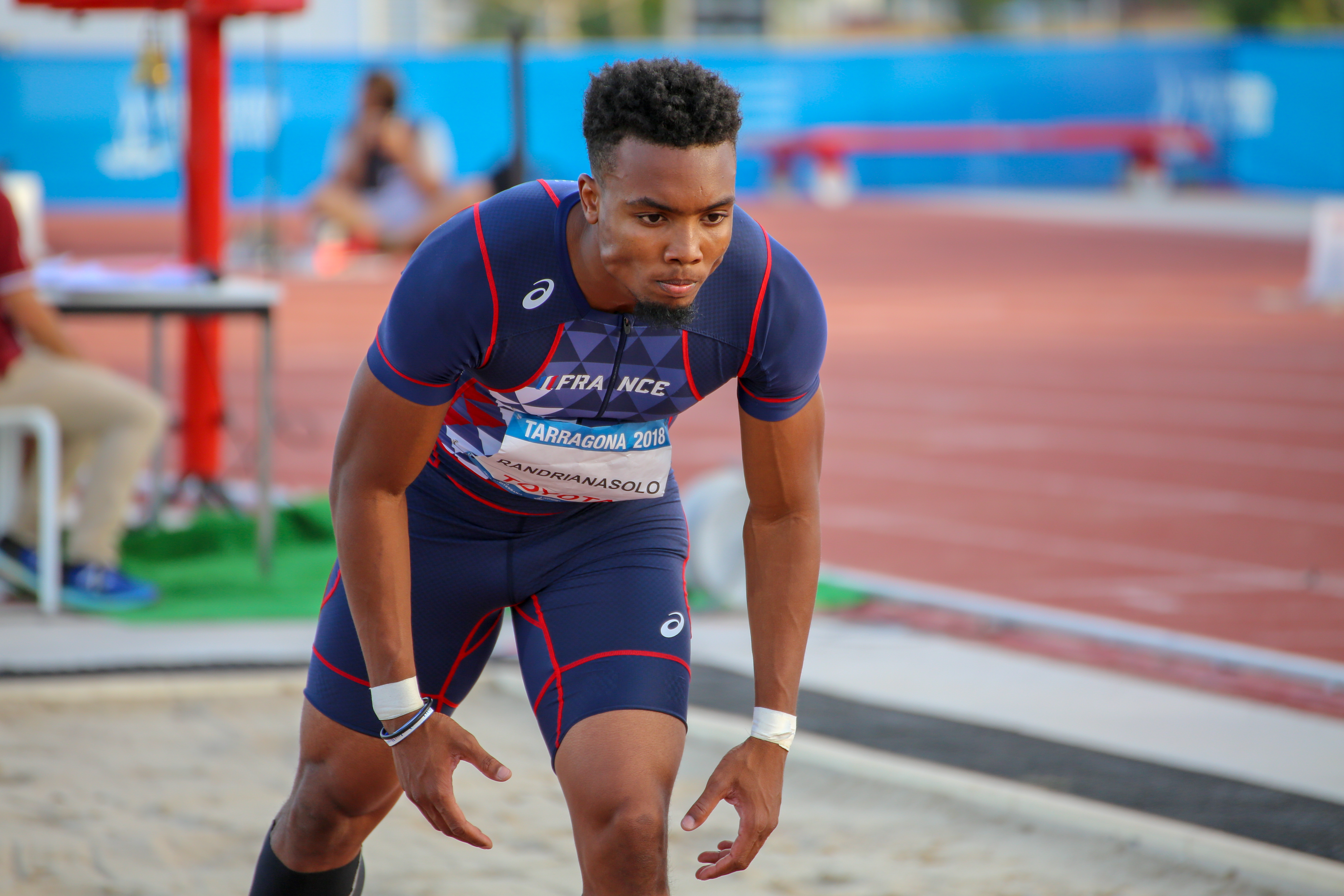 Yann Randrianasolo en el salto de longitud de los Juegos del Mediterráneo 2018